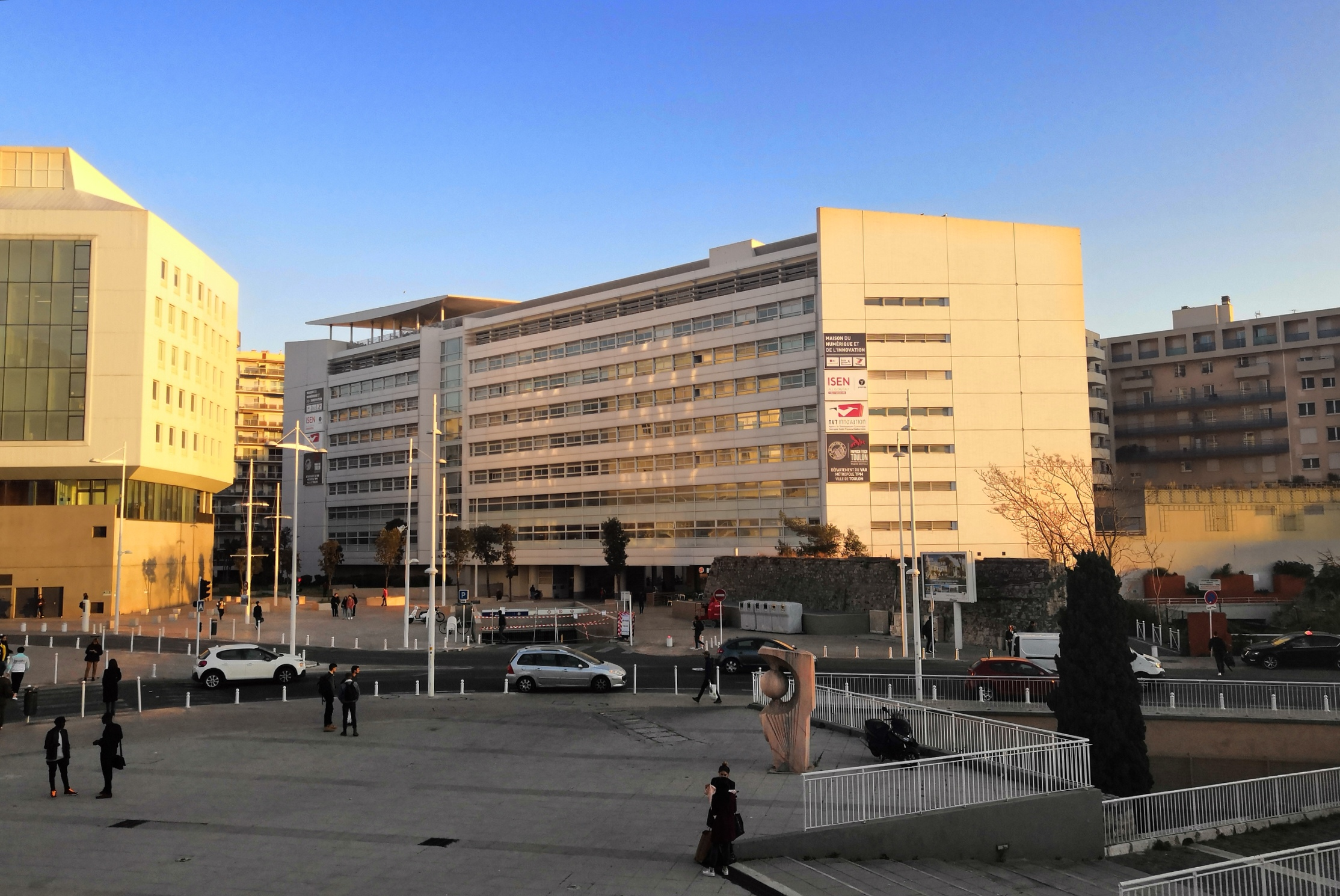 Maison du Numérique et de l'Innovation vue depuis la faculté de Droit de Toulon.